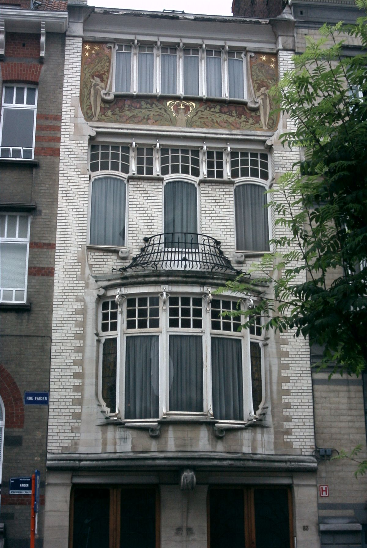 Brüsszel szecessziós városrésze, lakóházak